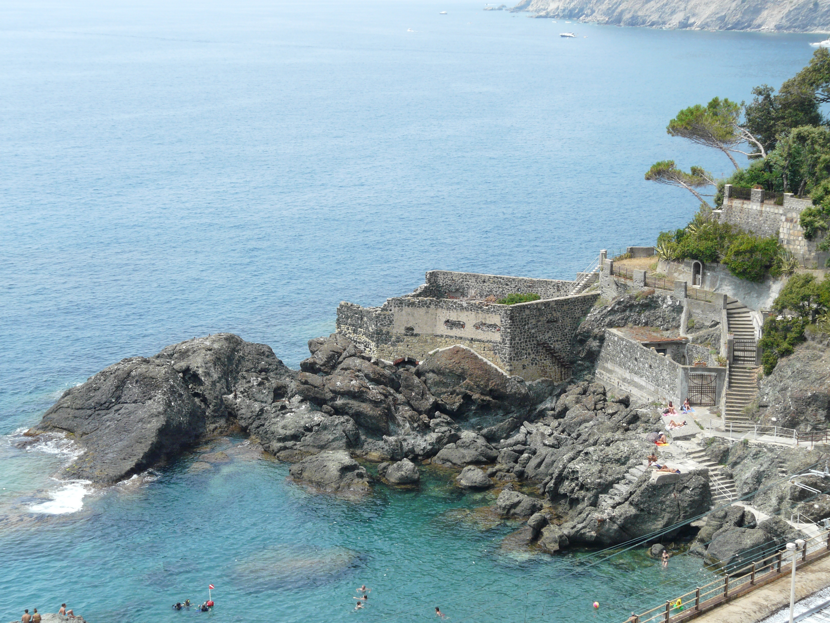 Spiaggia di Framura, Liguria, Italia